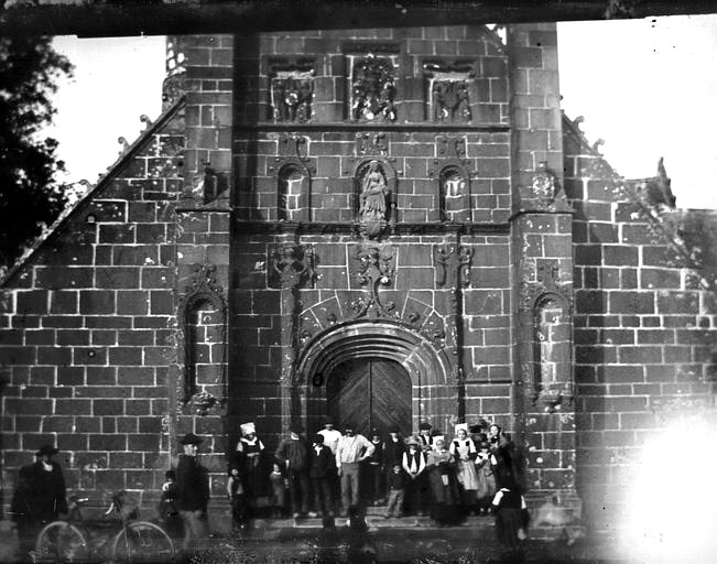 L'Hopital-Camfrout : la façade de l'église paroissiale vers 1900, avec personnages en costume breton ; auteur inconnu, base Mérimée)